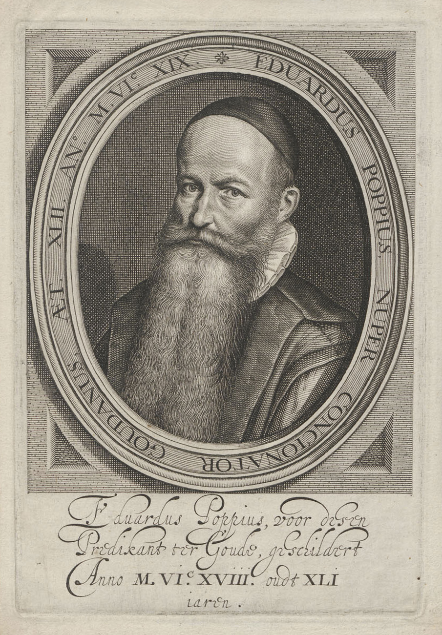 Portret van Eduardus Poppius (1576-1624)